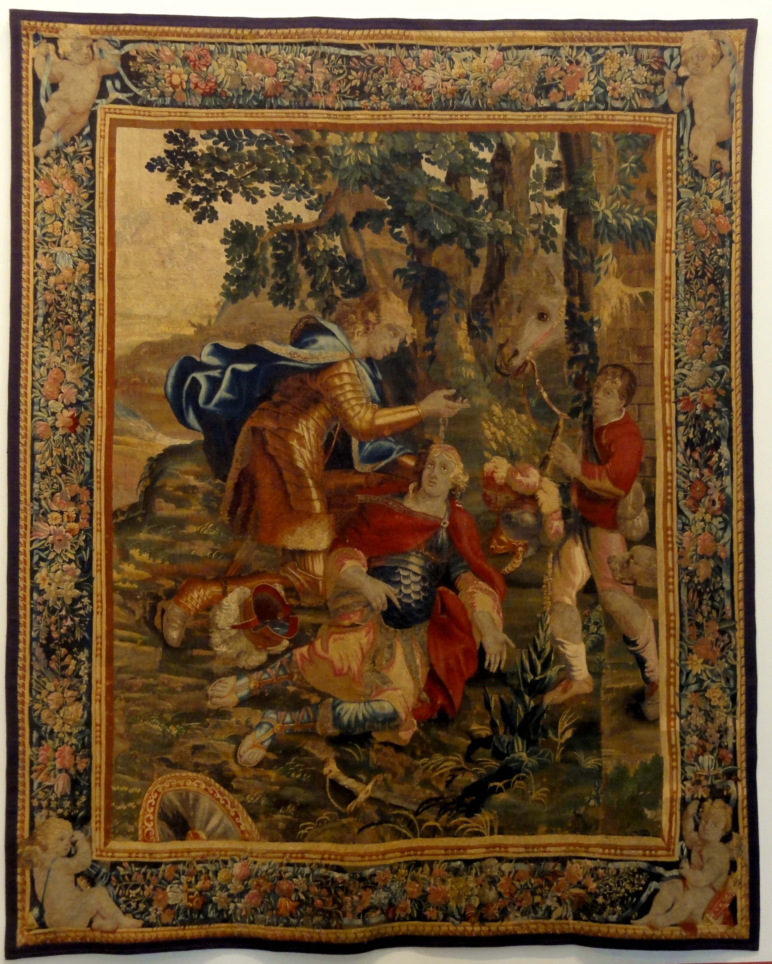 Collection de tapisseries des XVIe et XVIIe siècles (voir titre).